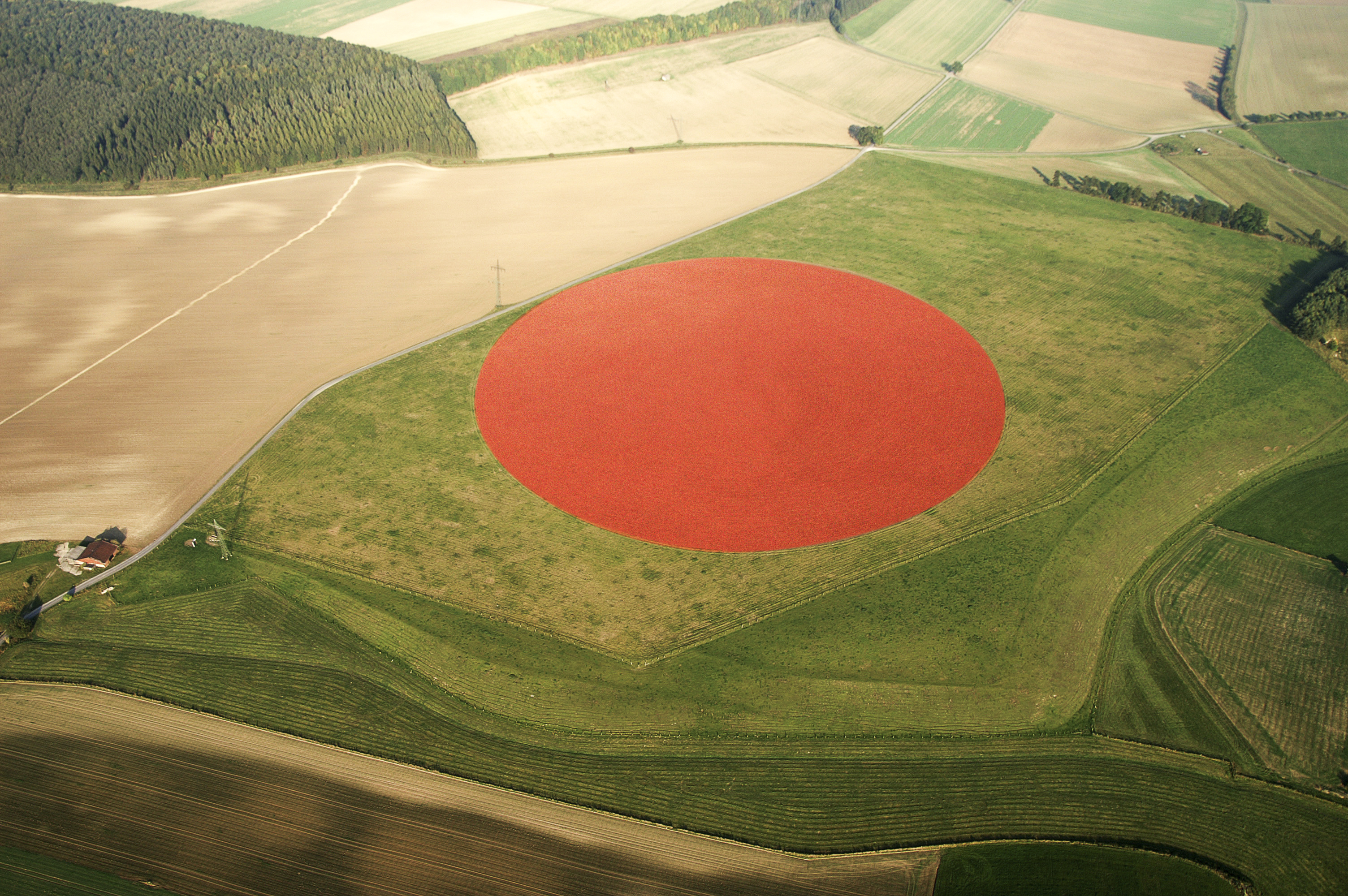 Mohnkreis, Ulrich Mertens, Atelier für Kunst und Fotografie